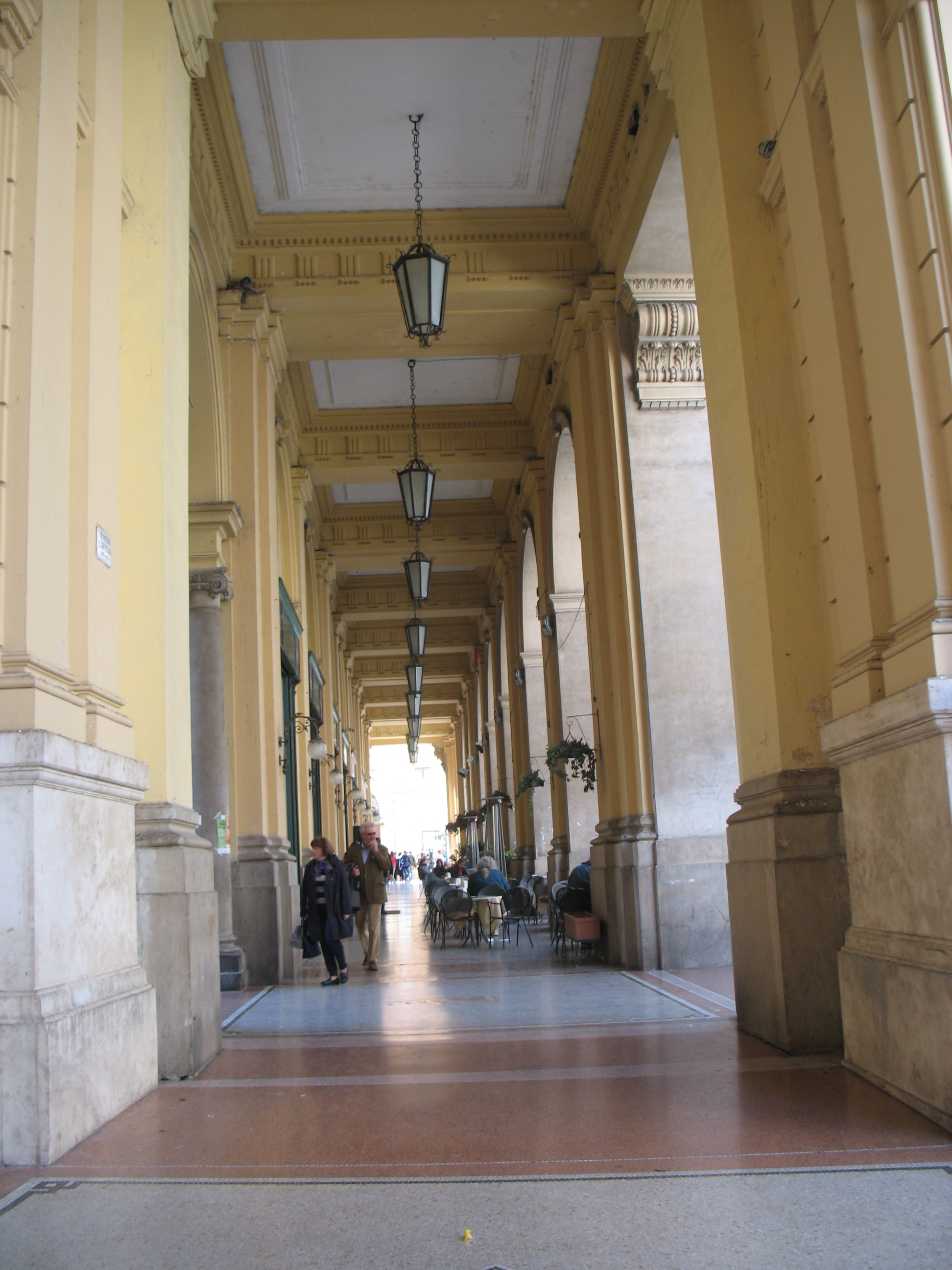 Portici del Palazzo della Provincia di Chieti.